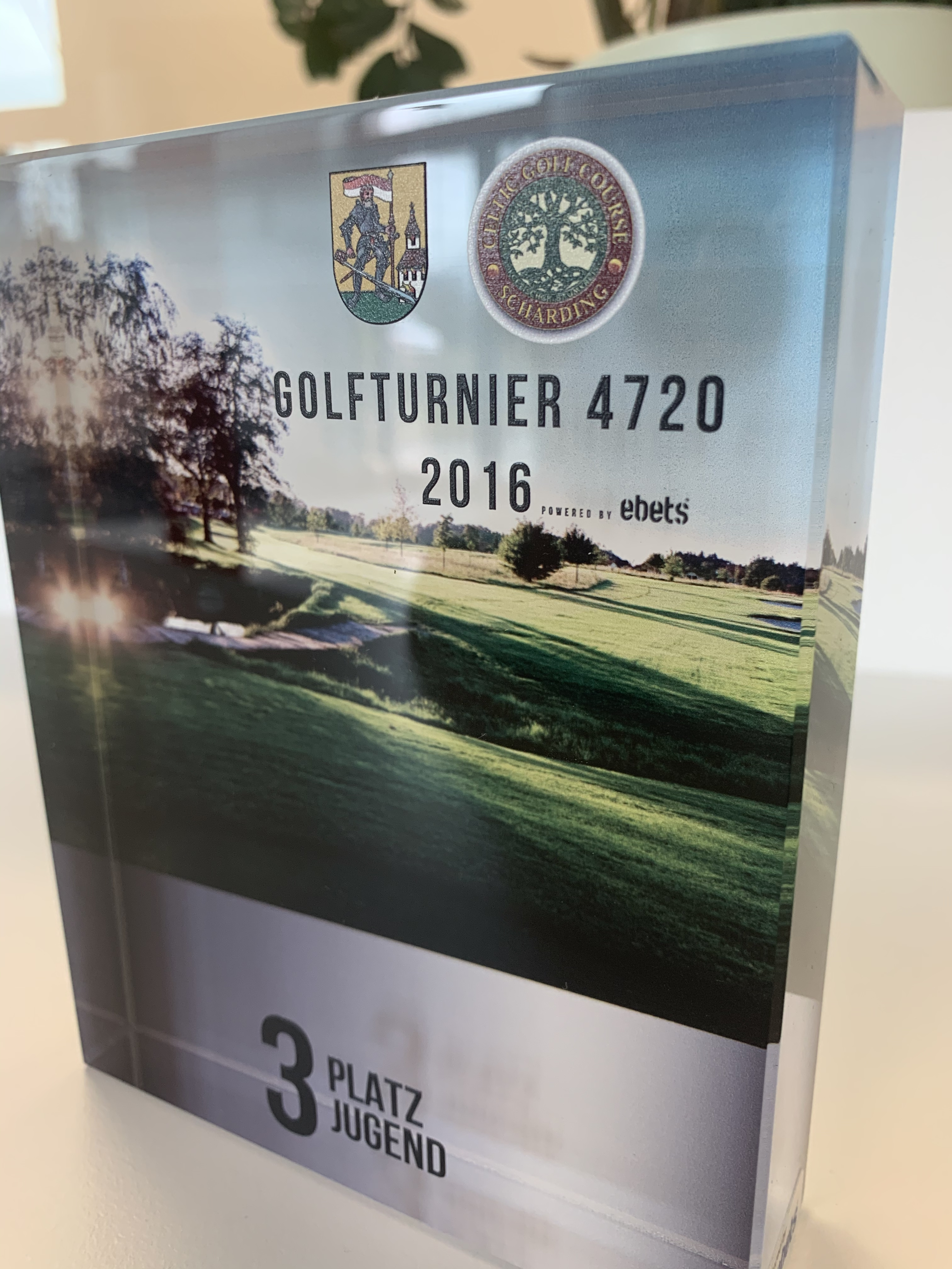 Beidseitig bedruckter Glasblock